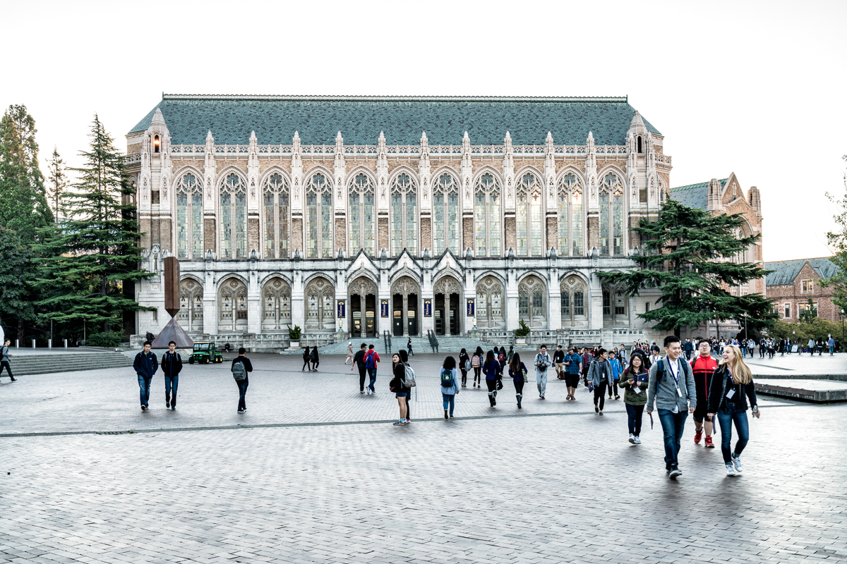 日本式の入学式はないが，オリエンテーションはある。